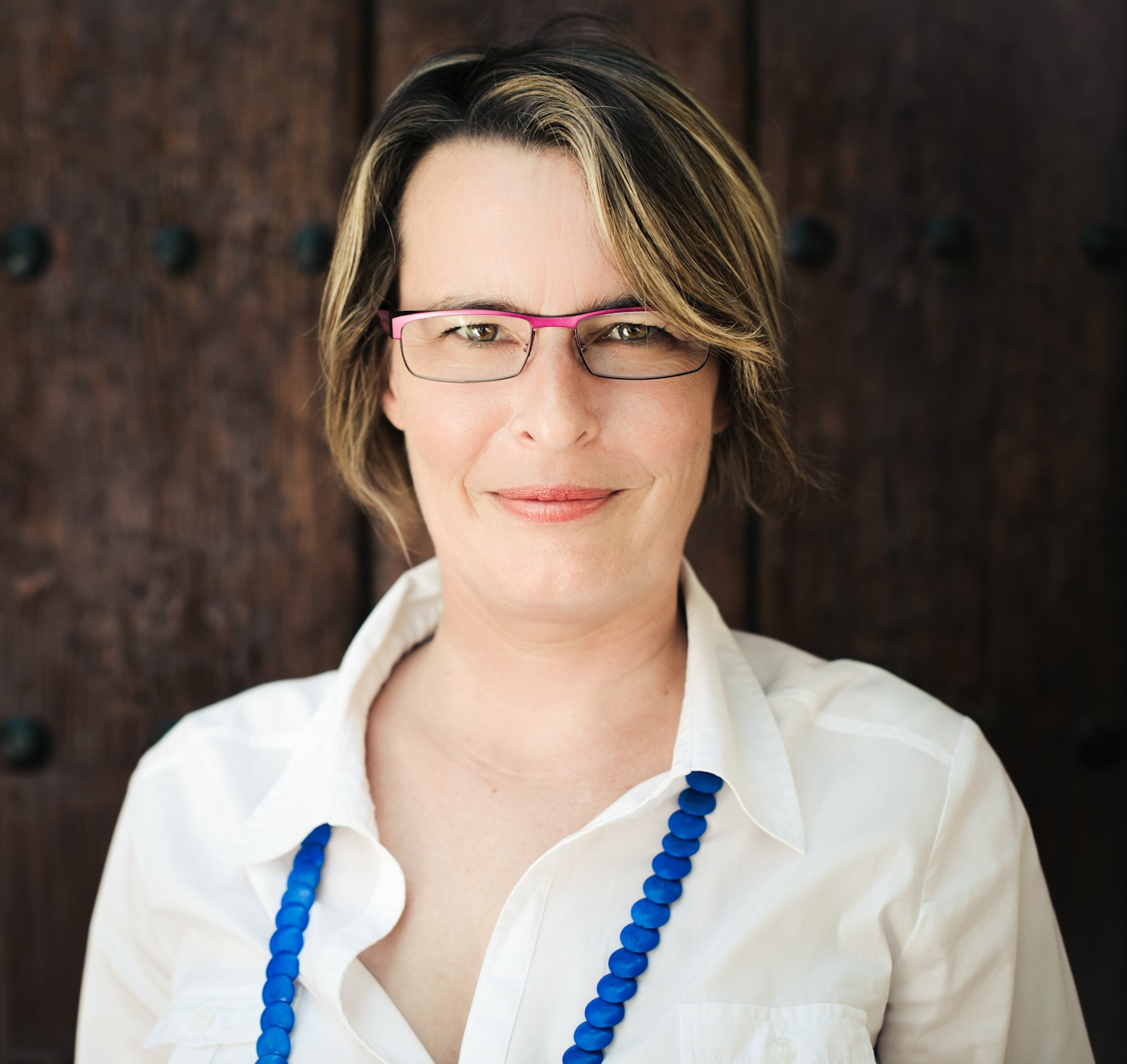 Foto: Guillermo Casas Baruque. Festival Internacional de Teatro Clásico de Almagro.